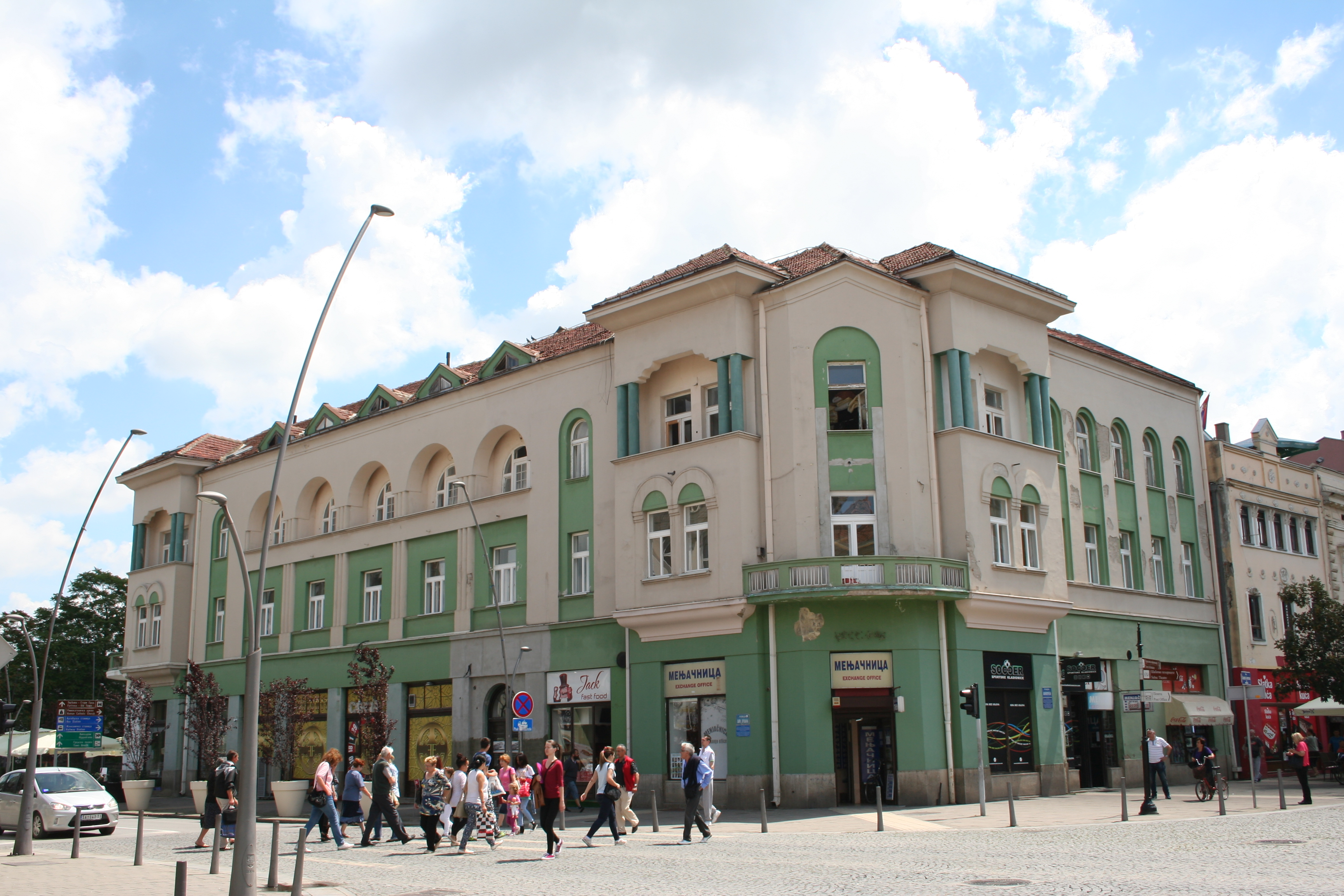 Zgrada hotela "Zeleni venac"